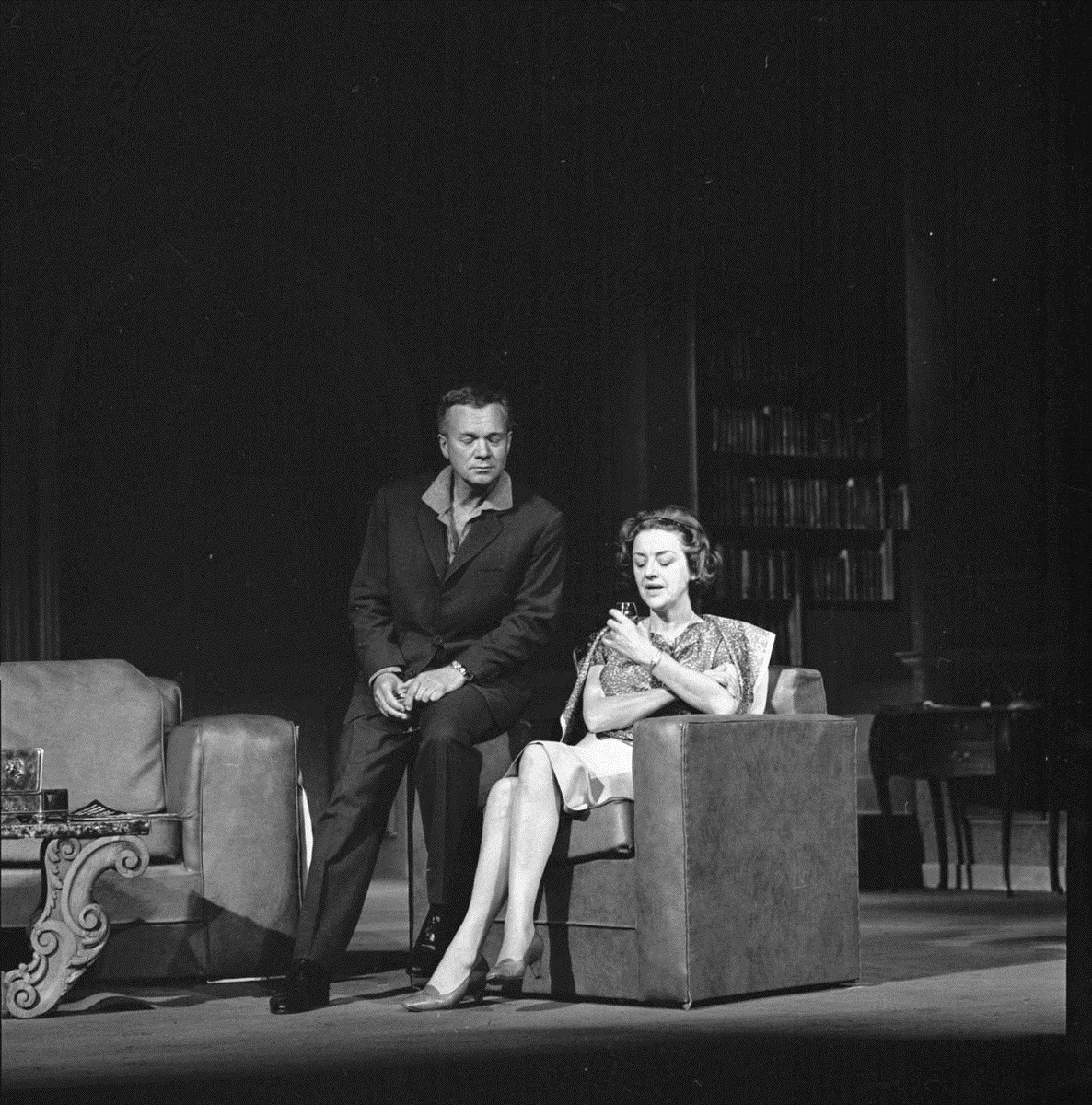 Aase Bye og Jørn Ording på Nationaltheatret.